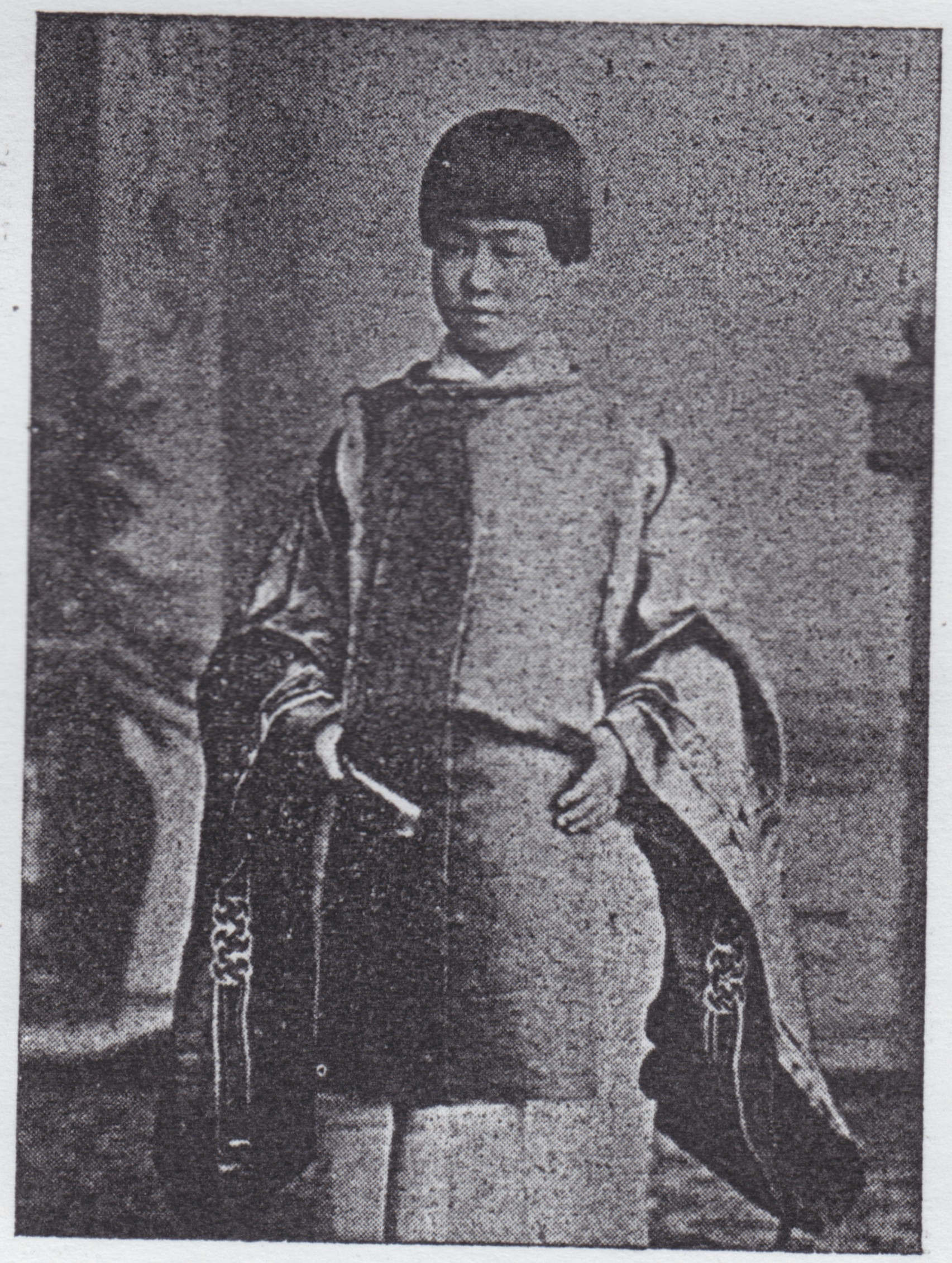 佛光寺第28代門主・男爵渋谷隆教の幼少時の写真